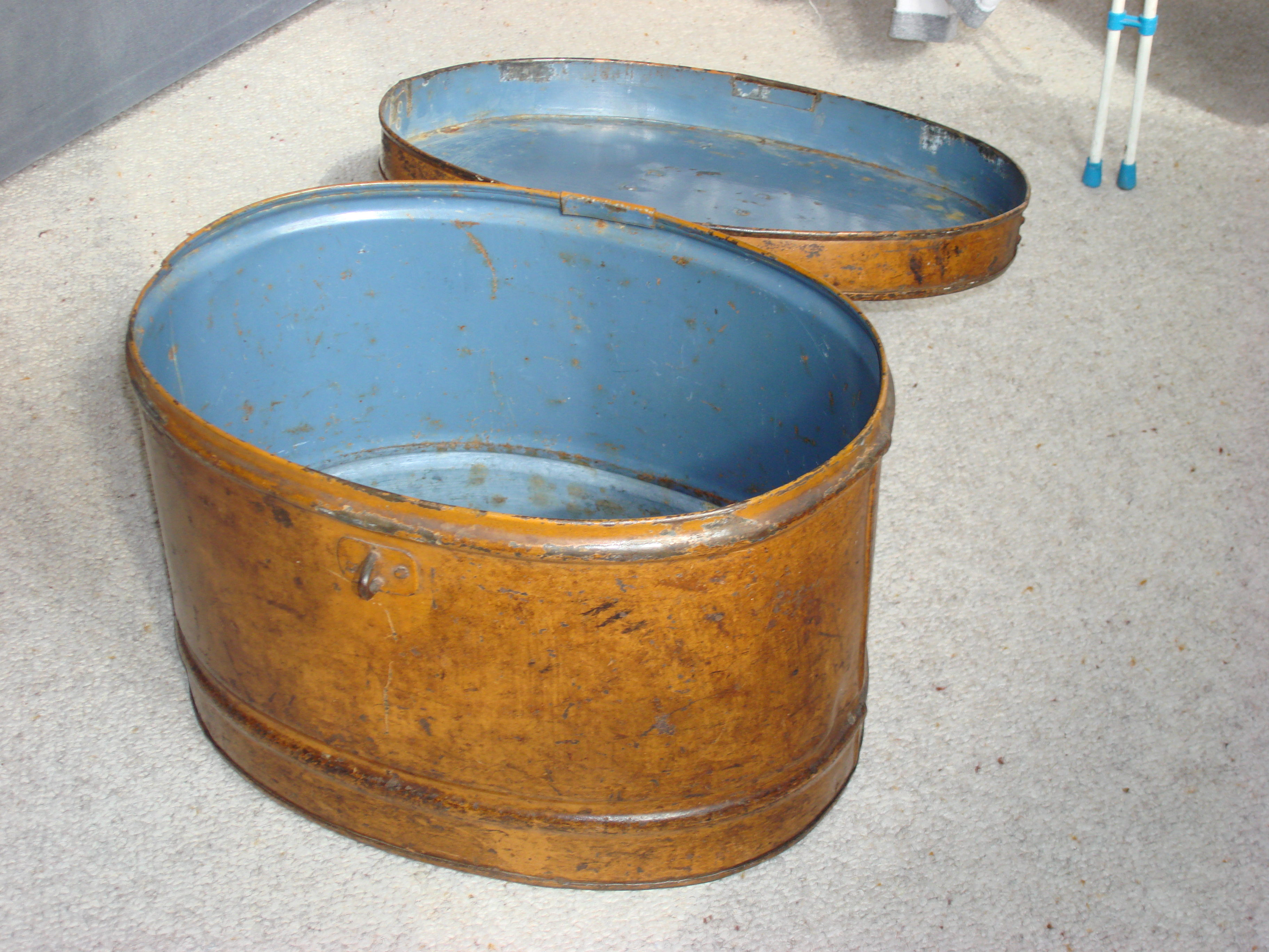 A hat tin